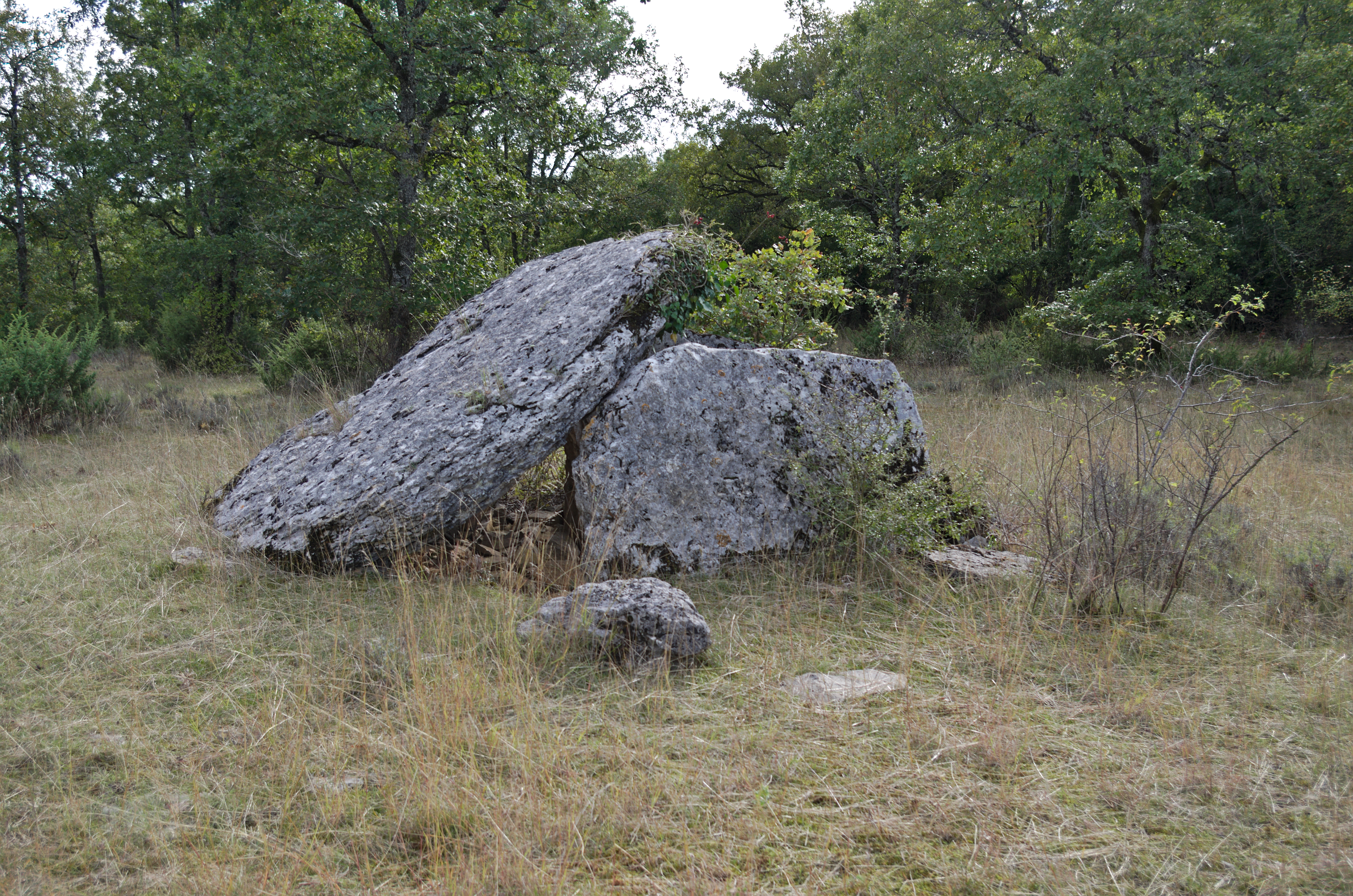 Dolmen de Dirau